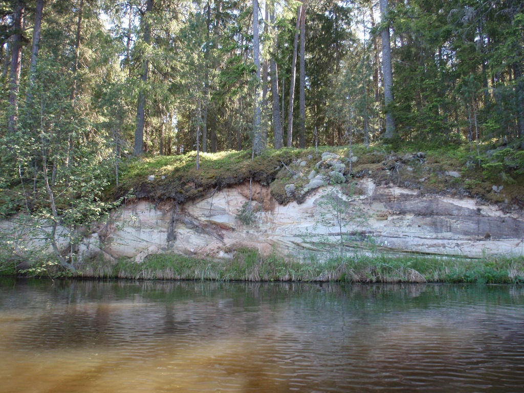 Nõmme pae, 2015 mai